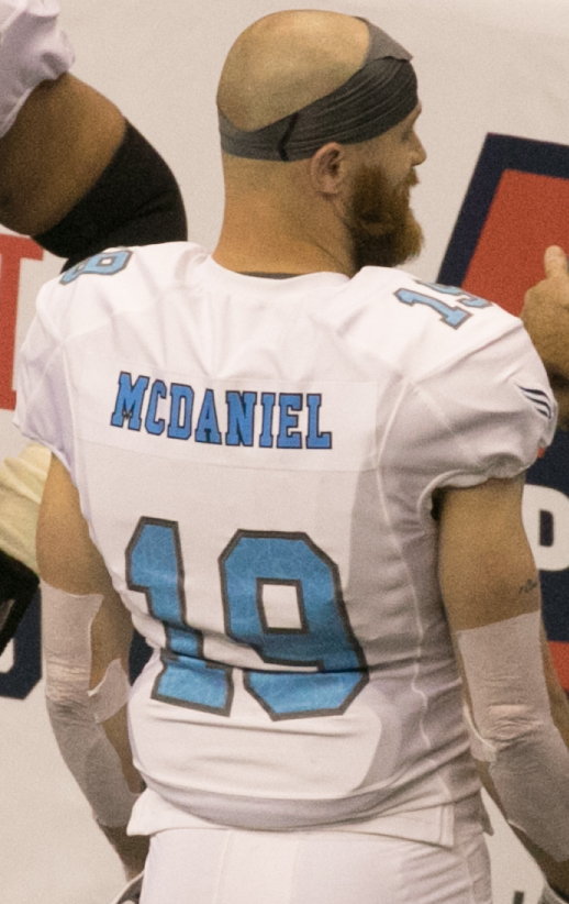 Valor 47 / Philadelphia Soul 48